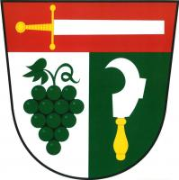 Stříbrnice (UH), znak